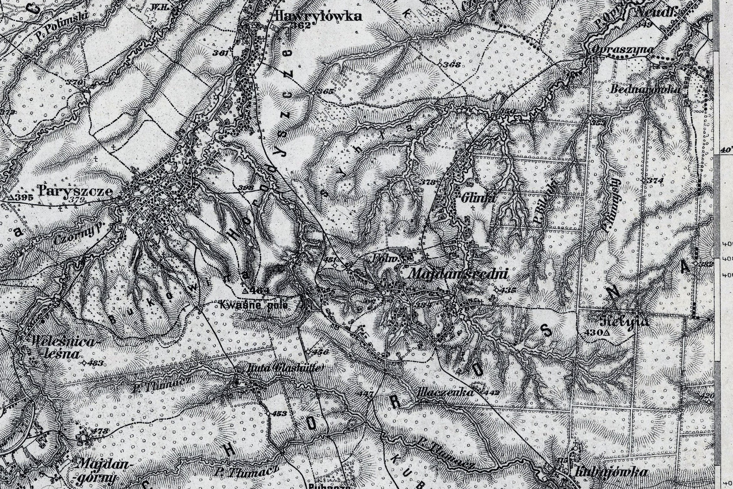 Фрагмент австро-угорської карти 1874 року, лист 45-73 "Надвірна", с. Середній Майдан